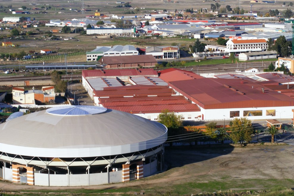 Vista del oeste de Navalmoral de la Mata (provincia de Cáceres, España) desde la zona del Multiusos